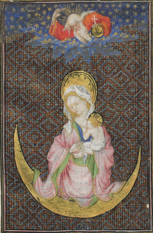 Maître de Rohan. Vierge à l'Enfant sur un croissant de lune.